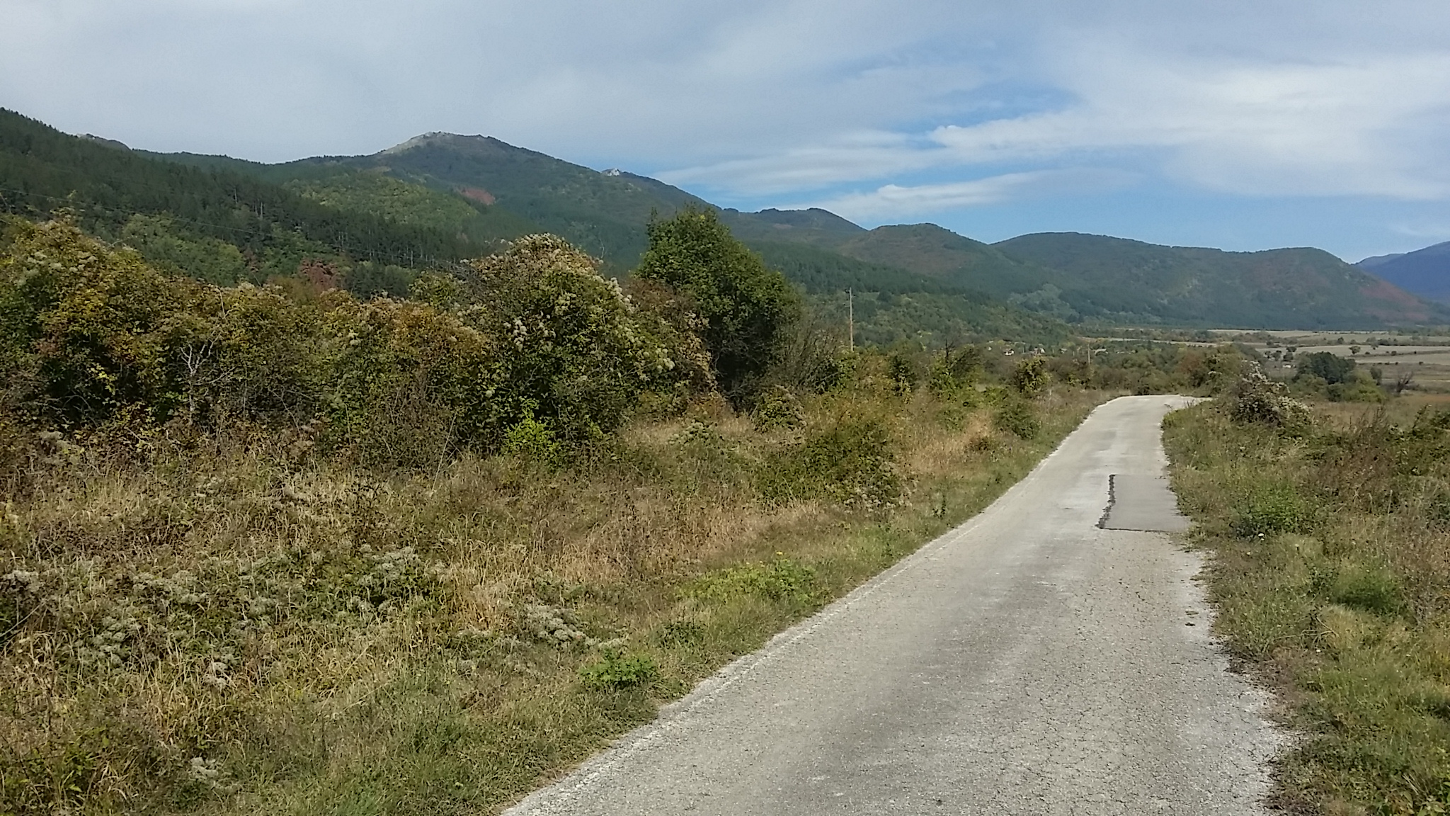 Село Ранилуг